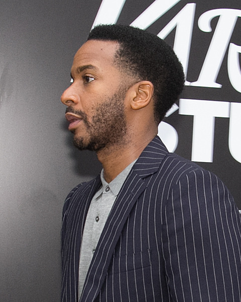 Toronto International Film Festival 2016